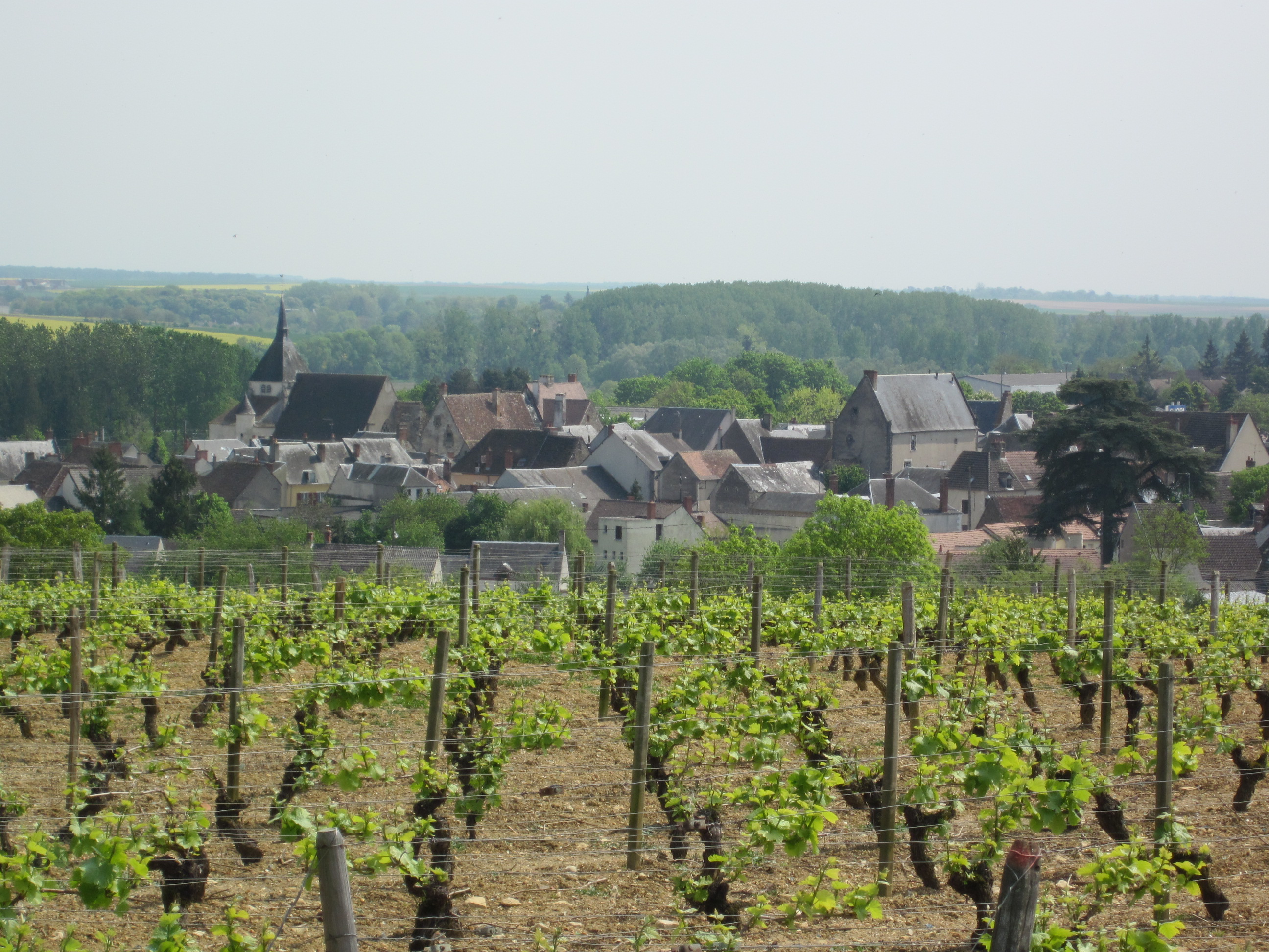 Vue de Reuilly (Indre) depuis le chemin des Congés Vue des vignes, du bourg, de l'église et du Cellier-Dieu